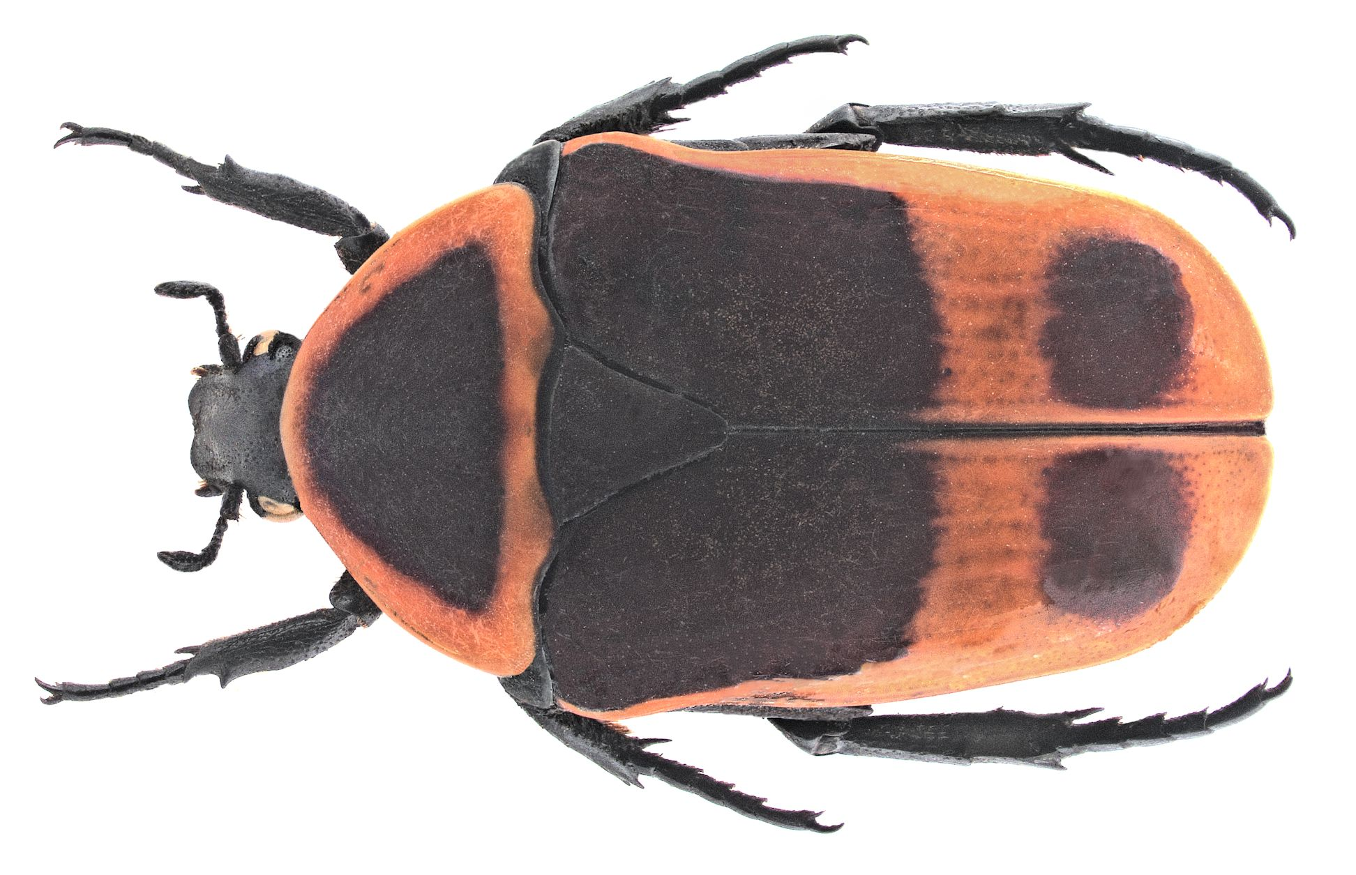 Familie: Scarabaeidae Grösse: 18-26 mm Fundort: Tansania det. U.Schmidt Foto: U.Schmidt, 2005